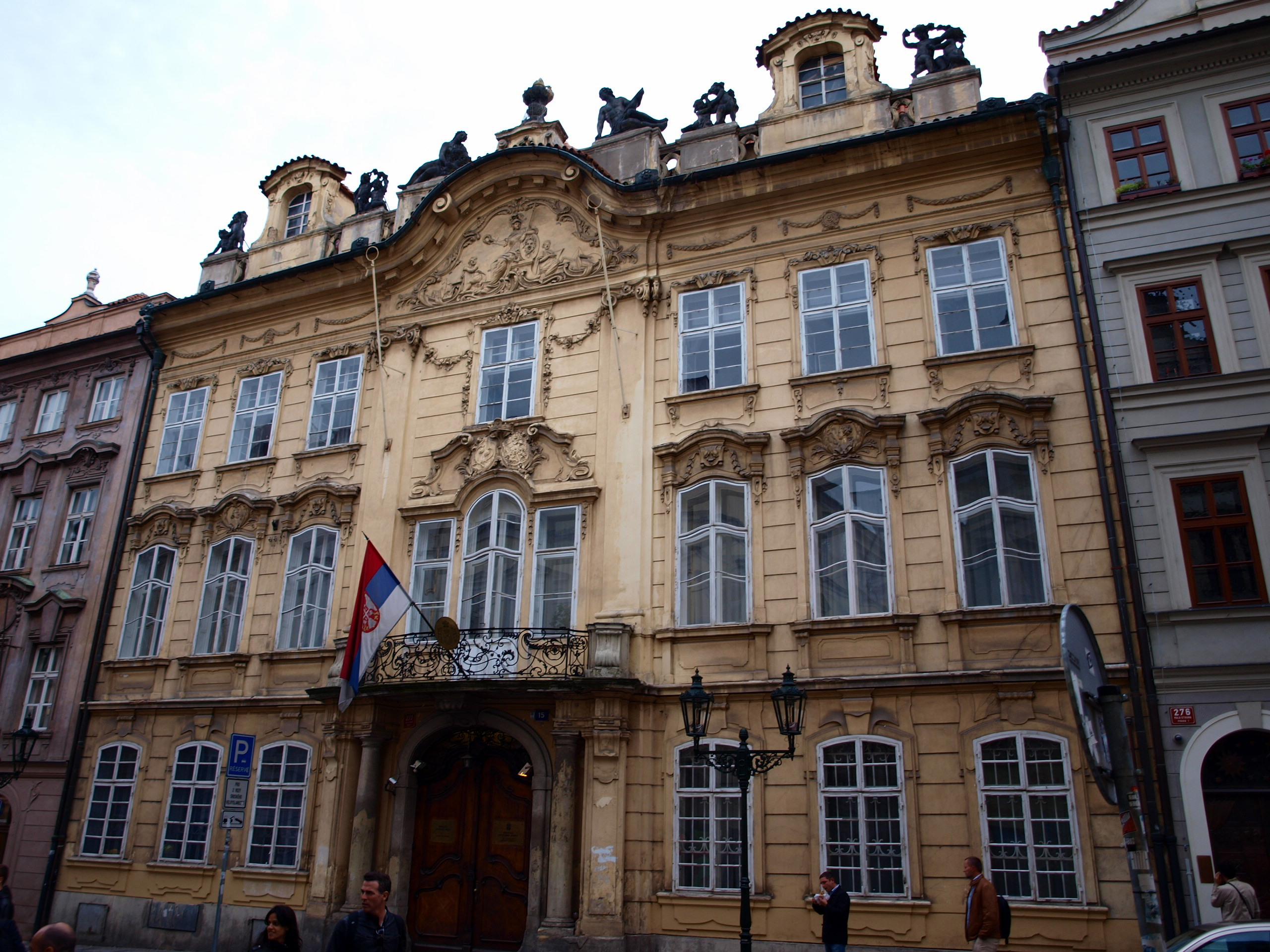 Kaunický palác, Mostecká